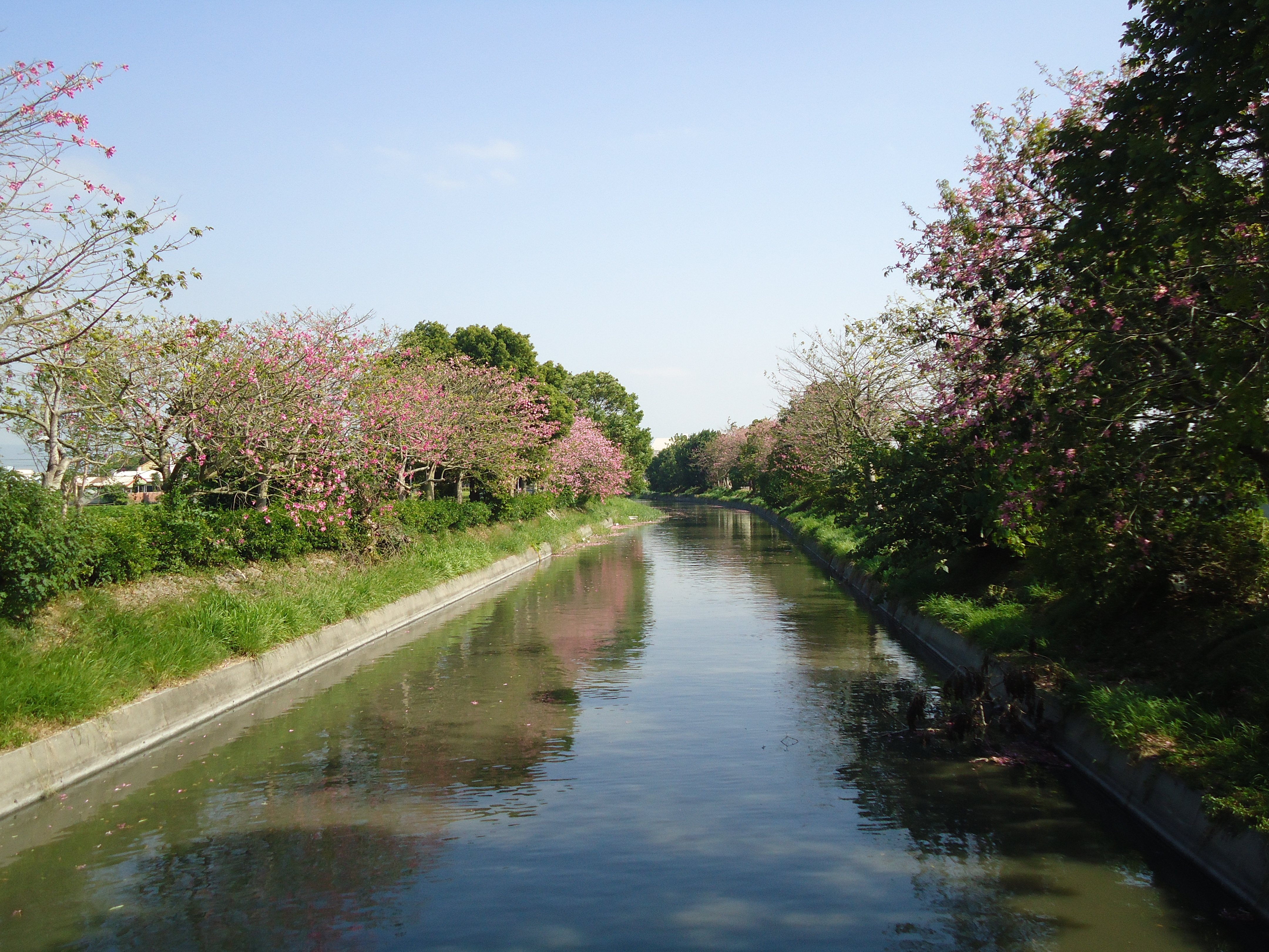 北斗河濱公園位於臺灣彰化縣北斗鎮，此圖攝於十月中旬，美人樹花期。